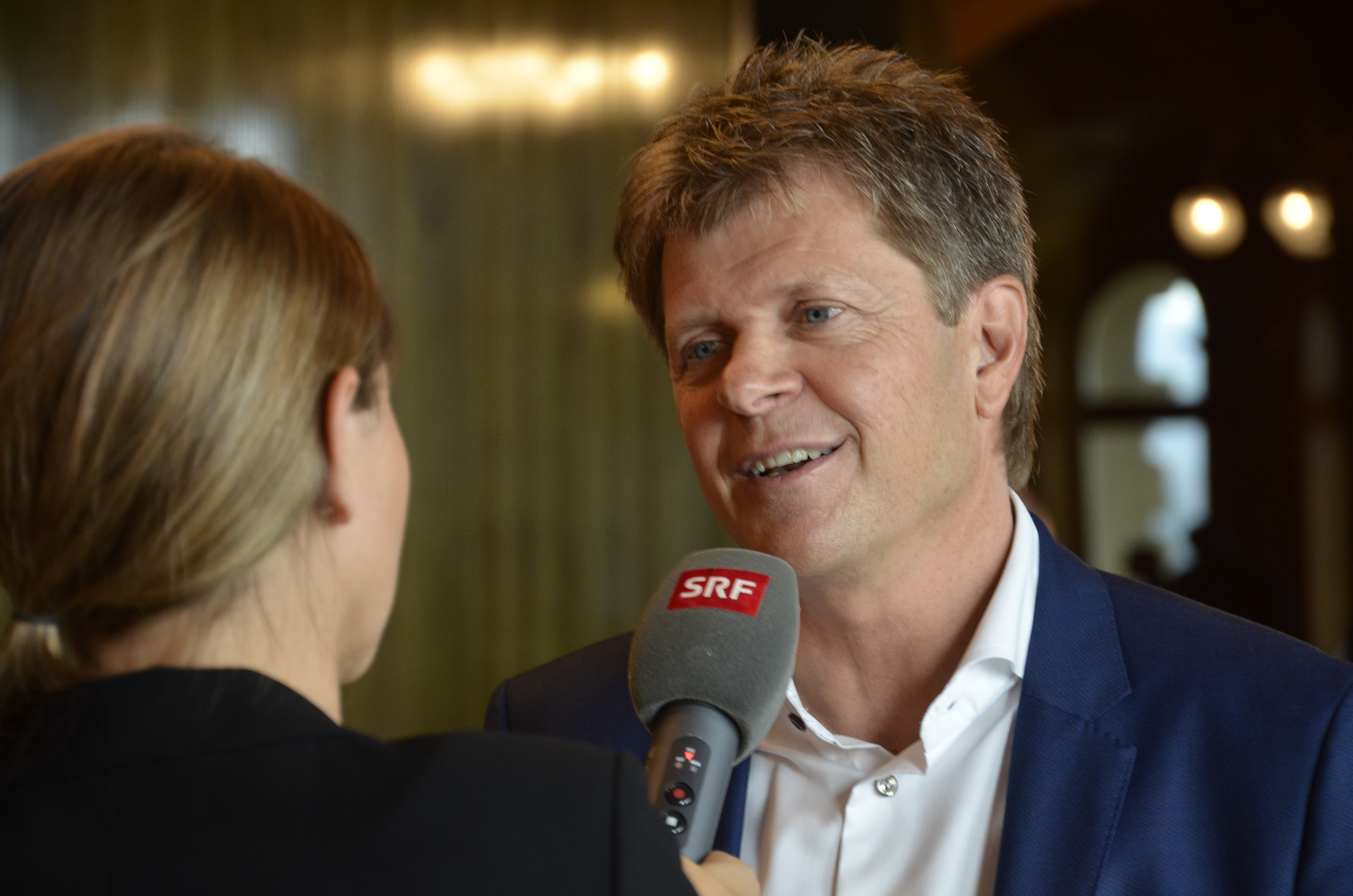 Schweizer Parlamentswahlen 2019: Wahltag im Bundeshaus, Nationalrat Jürg Grossen, Parteipräsident der Grünliberalen wird interviewt